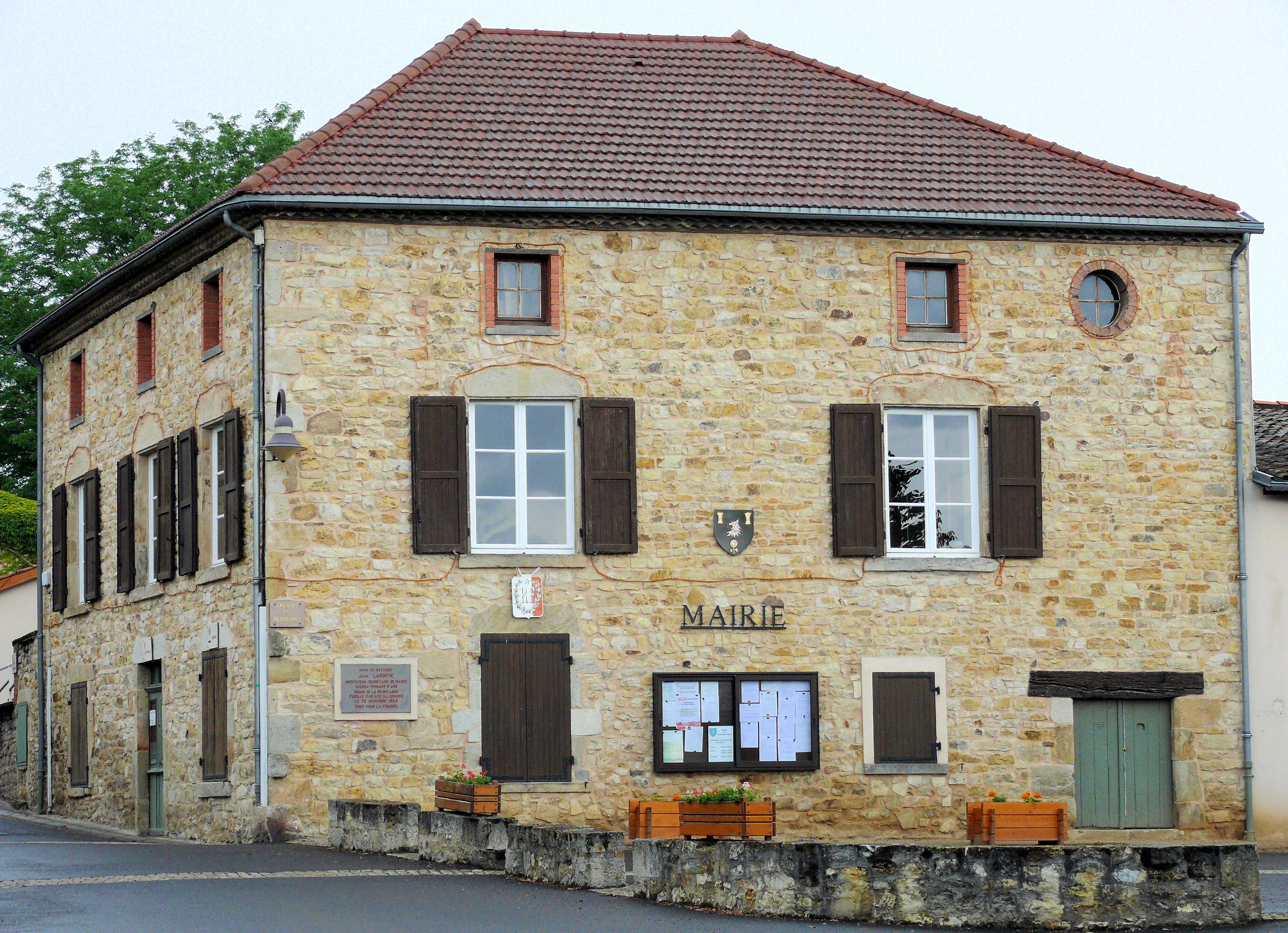 Glaine-Montaigut - Mairie